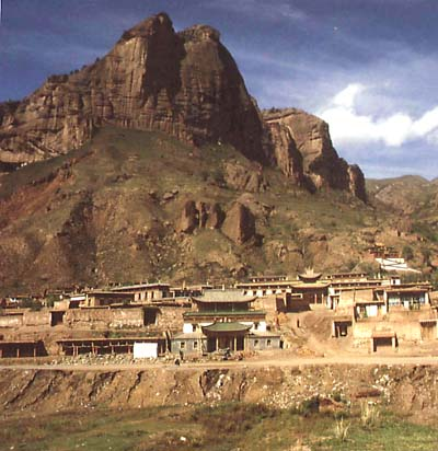 Pohled na klášter Ragya Gompa